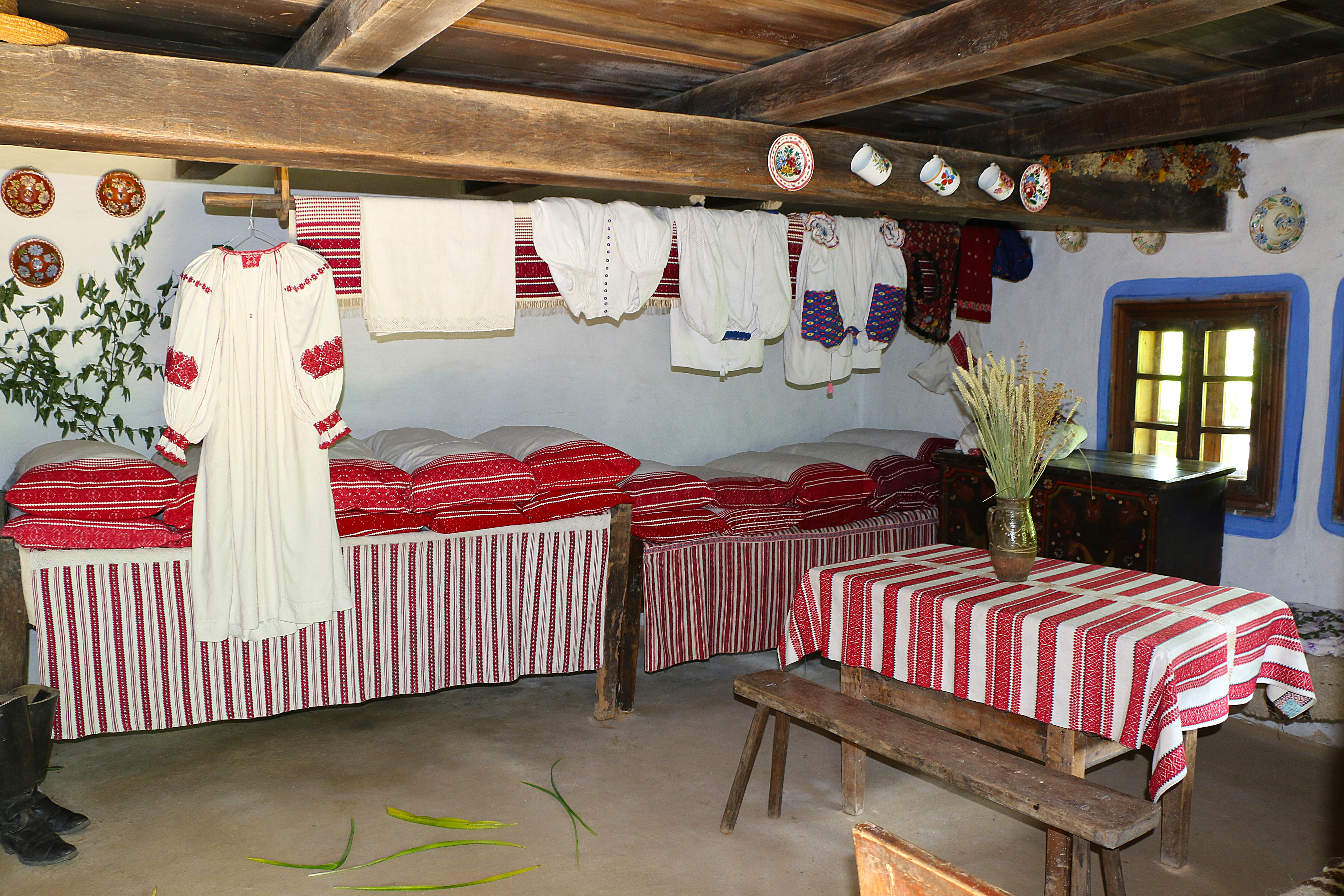 Хата з села Стеблівка Хустського району Закарпатської області, Київ, Пирогів